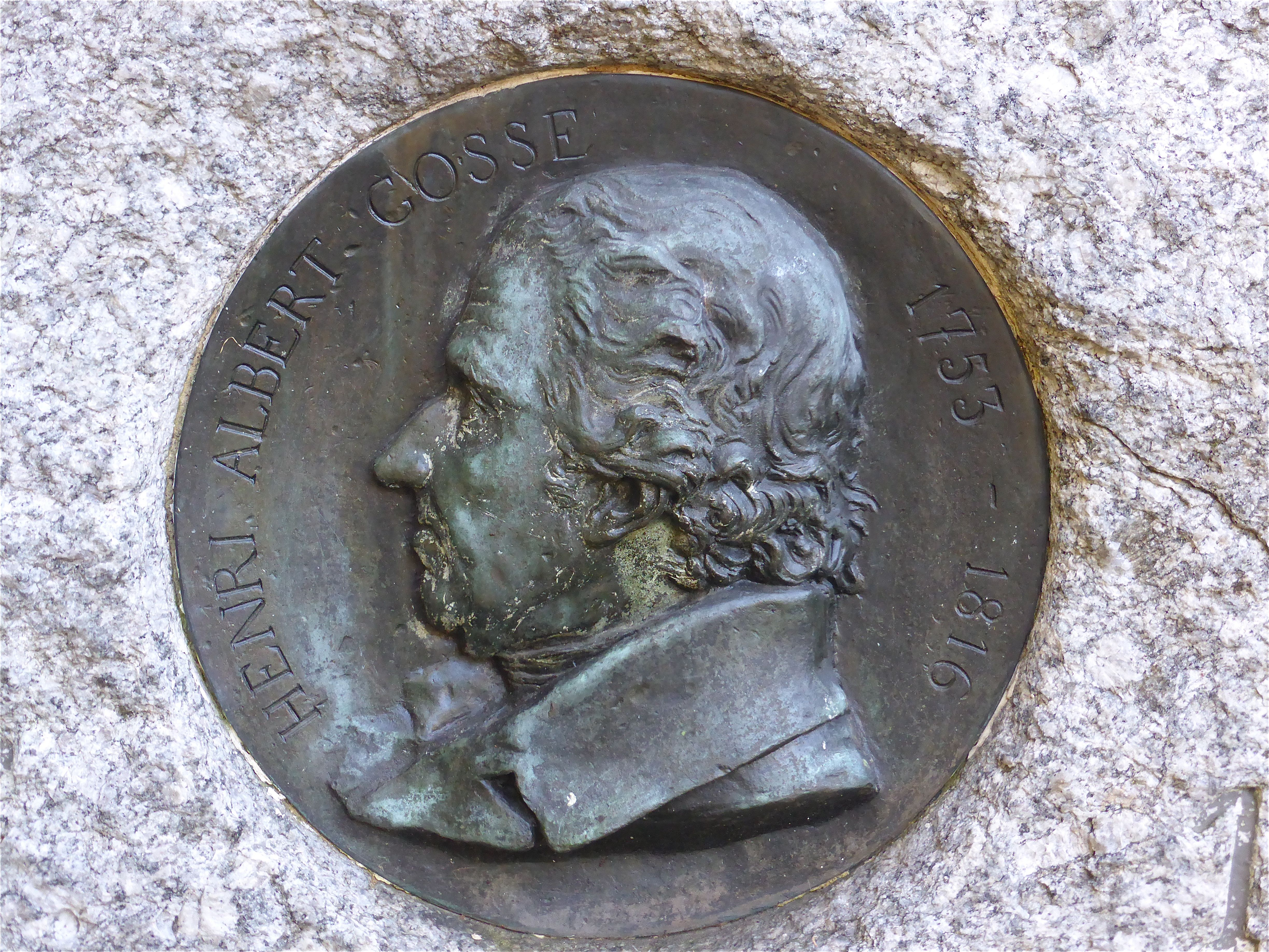 Portrait sur pierre commémorative Genève, les Bastions